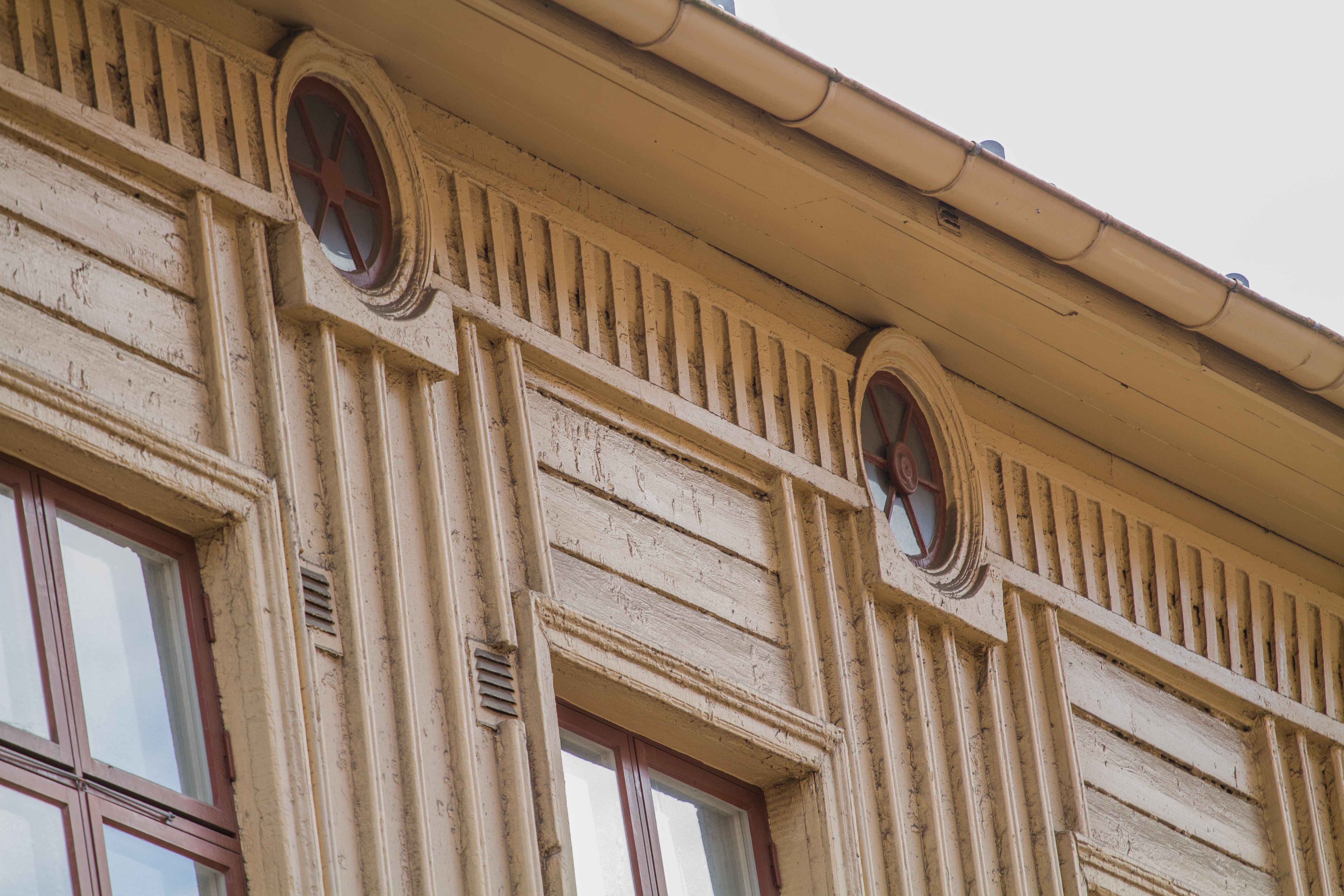 Detaljbild, bostadshus i trä i Haga, Göteborg.